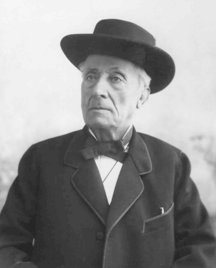 Foto che ritrae il barone Antonio Mendola (1828 – 1908)